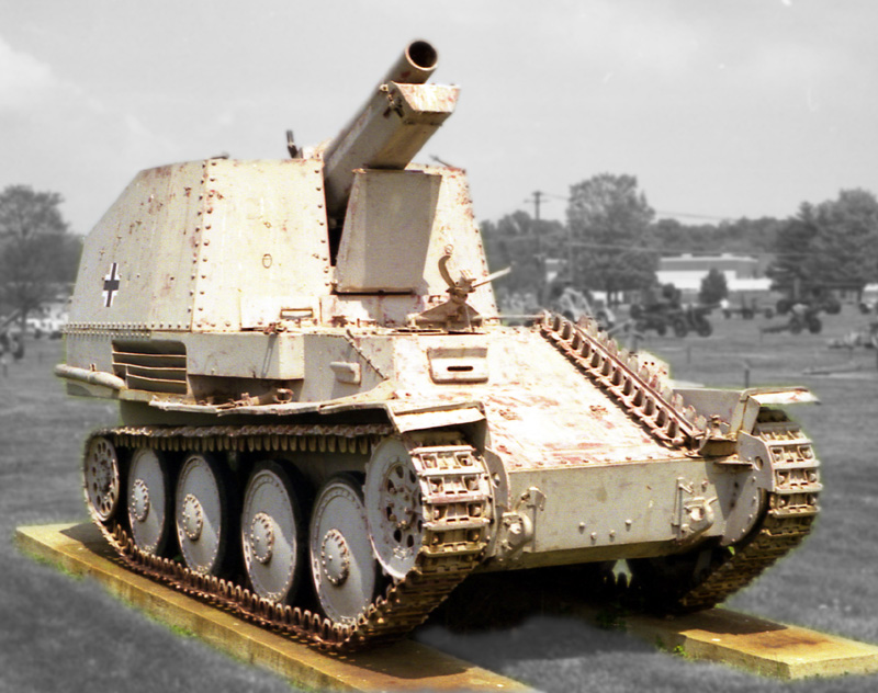 Geschützwagen 38M für s.I.G.33/2 (Sd.Kfz. 138/1) "Grille" Ausf. K on display at the US Army Ordnance Museum at Aberdeen. The picture taken 2000.